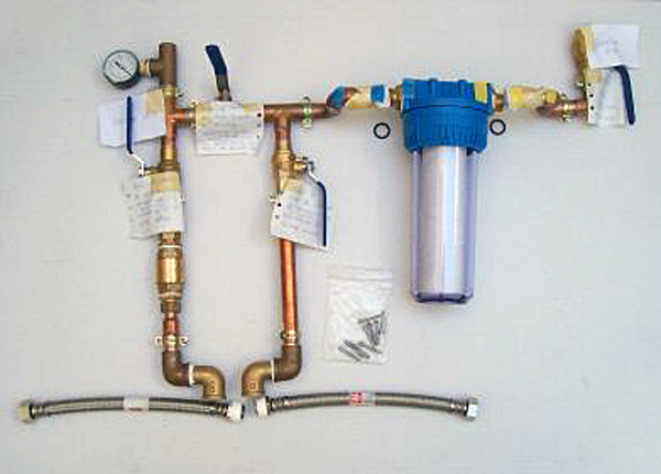 Divers tuyaux.